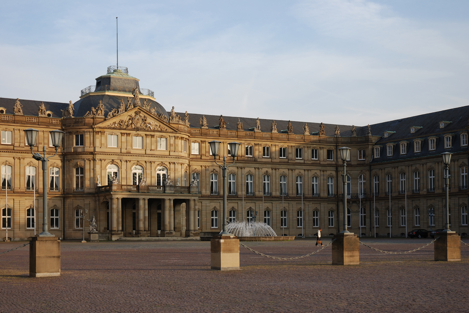 Neues Schloss Stuttgart